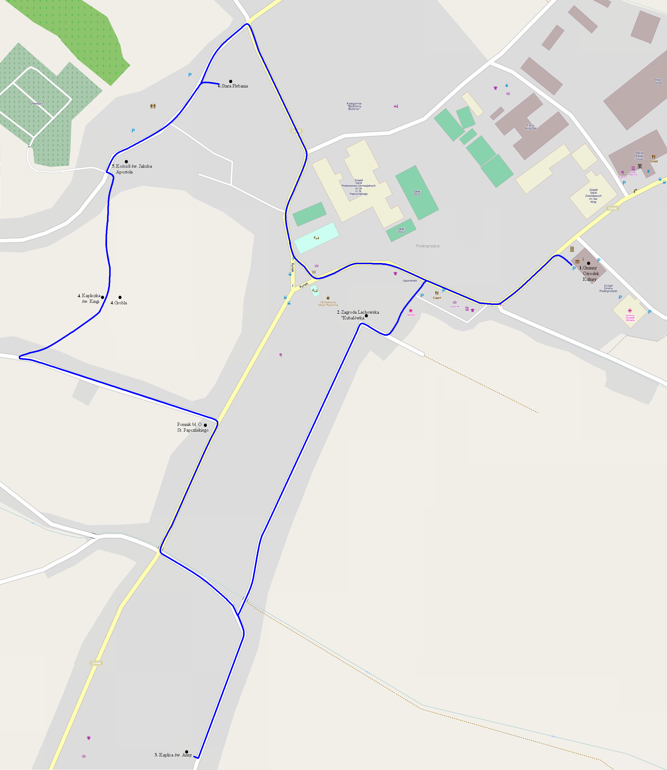 Mapa ścieżki historyczno-turystycznej "Podegrodzie przez wieki"